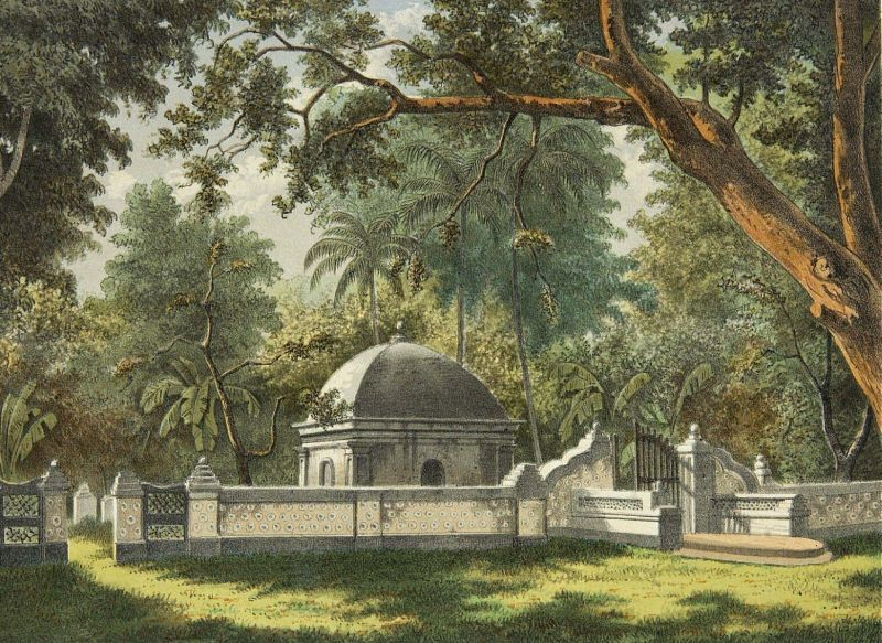 Litho. Kleurenlitho naar een oorspronkelijke aquarel van Rappard.. Een begraafplaats in Bontowala